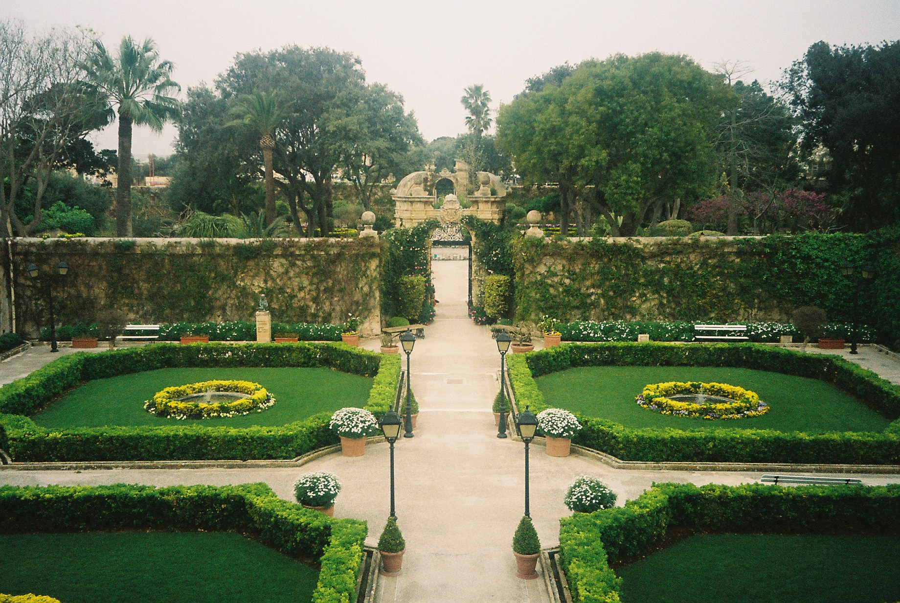 Naxxar, Palazzo Parisio Garden